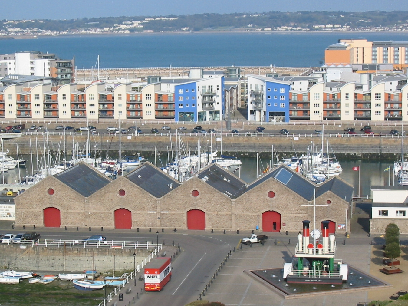 Nrf: Saint Hélyi, Jèrri